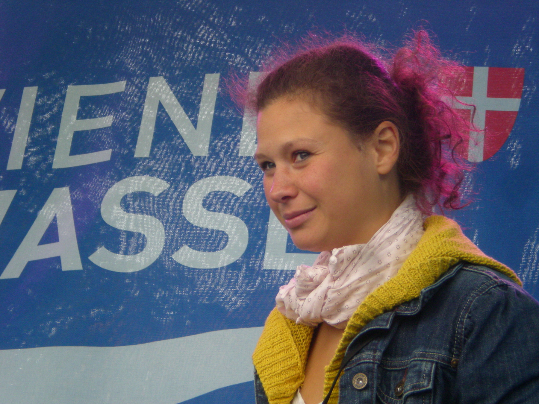 Christina Karnicnik beim Alles-Wasser-Fest auf dem Areal des Behälters Wienerberg in Wien-Favoriten